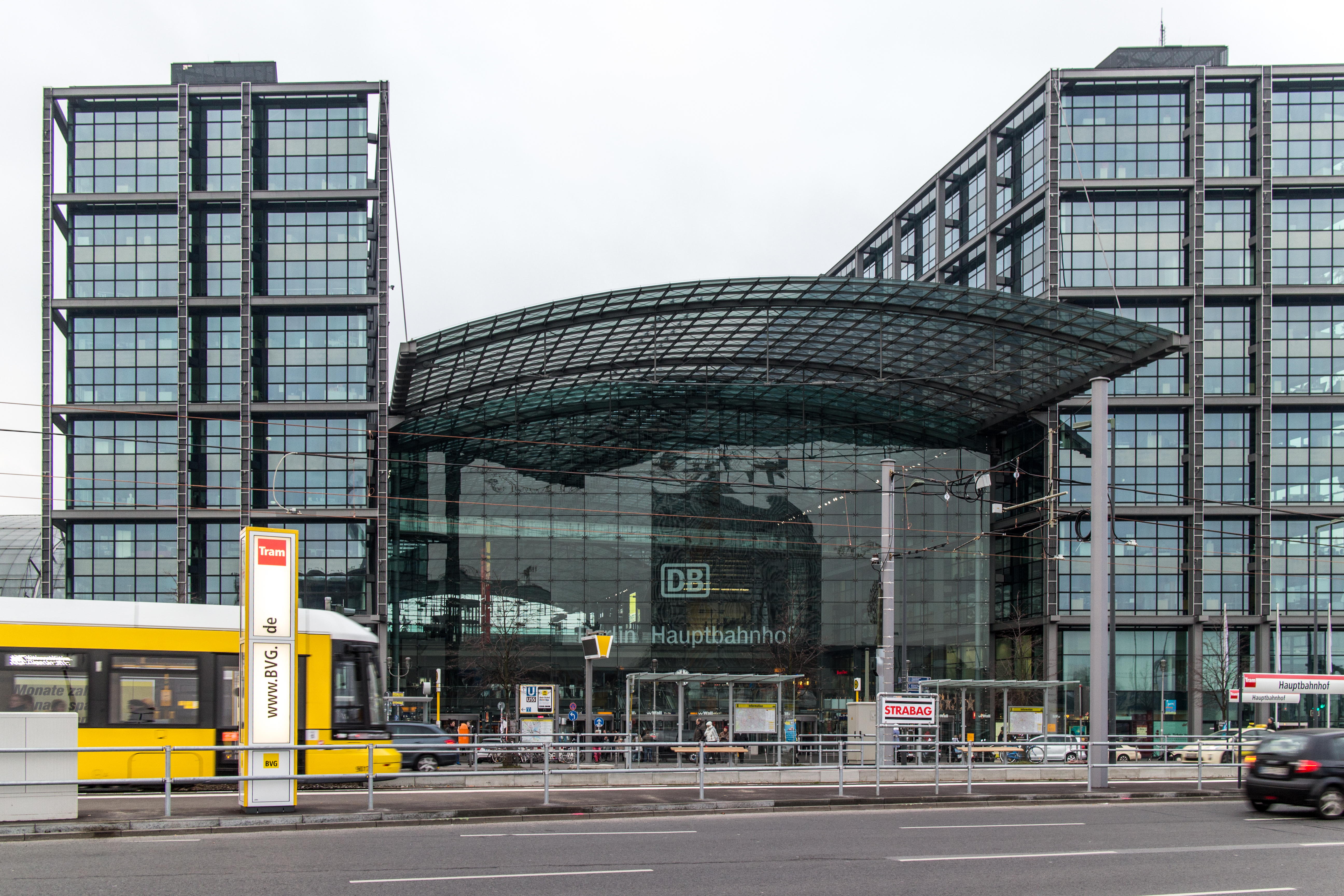 Tram der Linie M5 am Eröffnungstag des regulären Trambetriebes am Hauptbahnhof Berlin